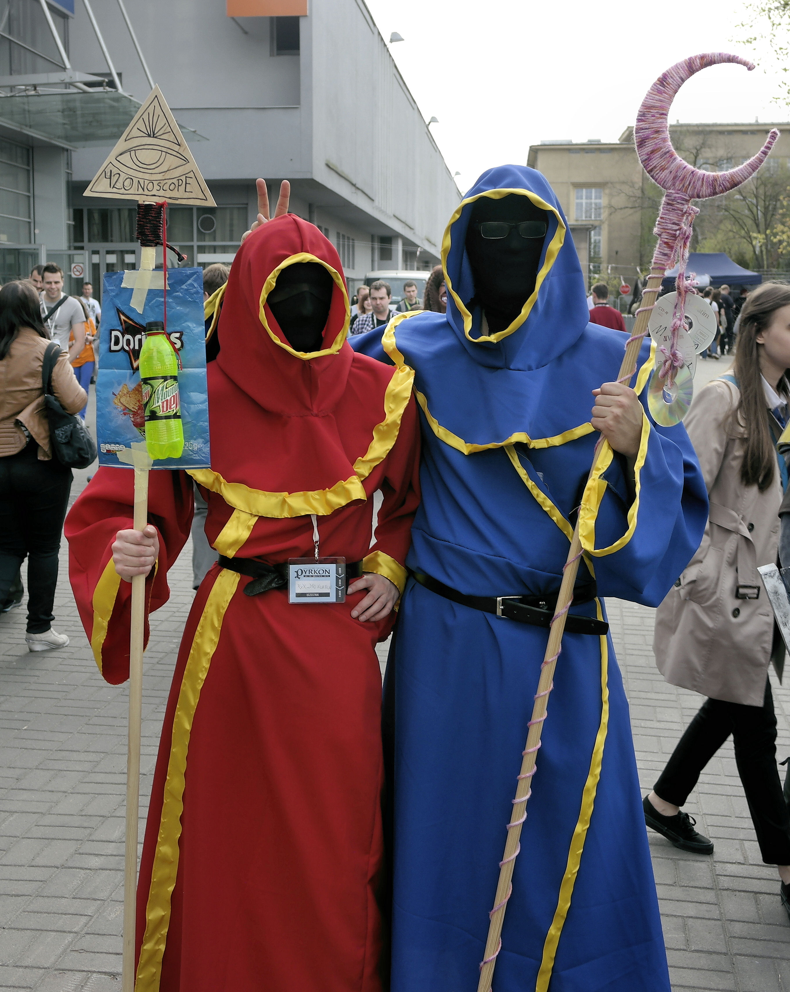 Cosplay Magicka, Festiwal Fantastyki Pyrkon w Poznaniu